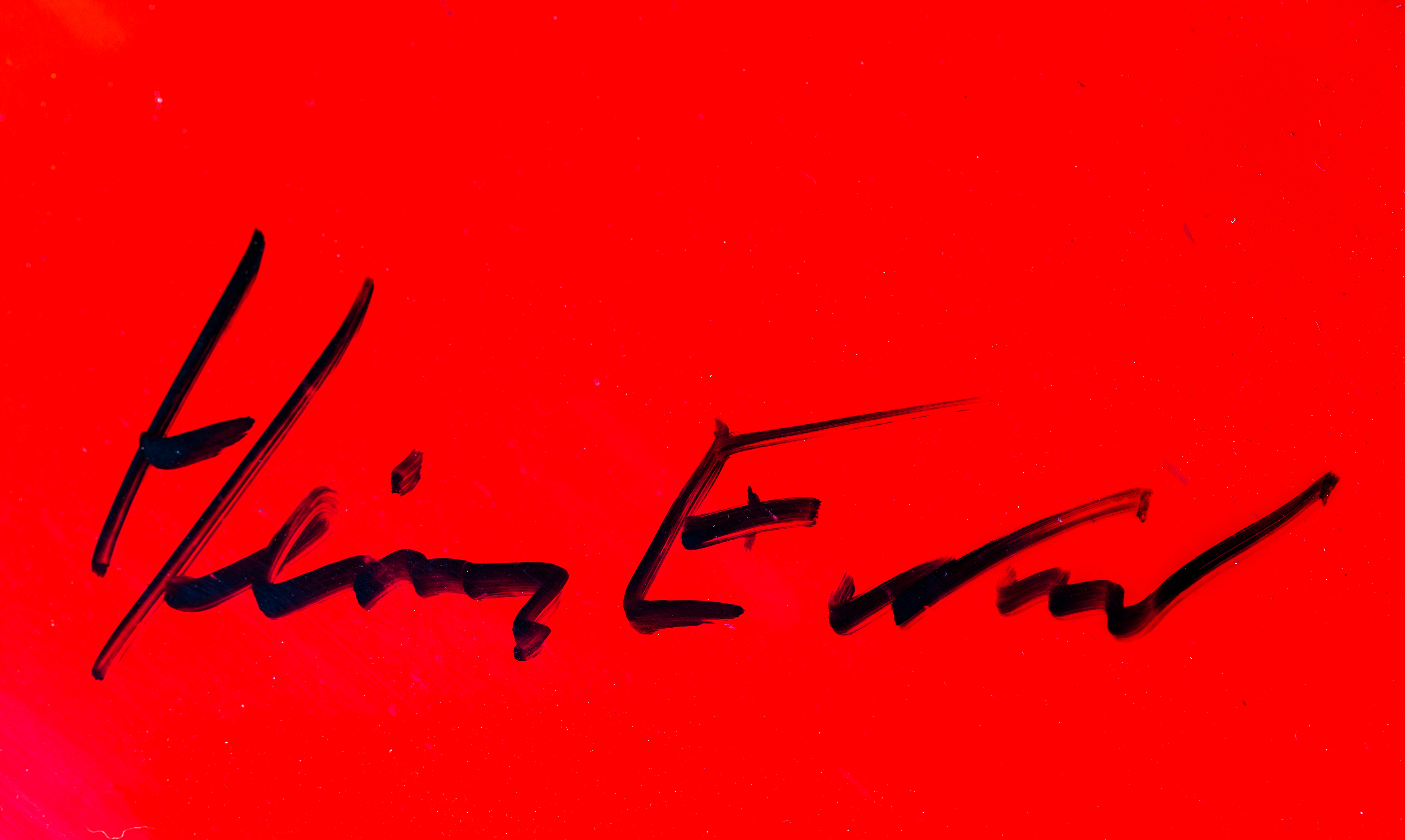 Signatur von Heinz Eckner auf einem VW Käfer 1200, Baujahr 1985. Der Wagen war von 2002 bis 2003 beim Buchprojekt „Stippvisite – ein Volkswagen Käfer fährt durch Deutschland“ im Einsatz.